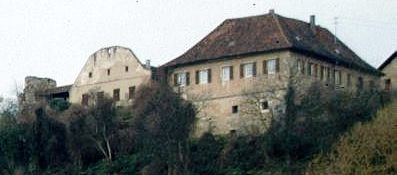 Neippergsches Schloss in Heilbronn-Klingenberg